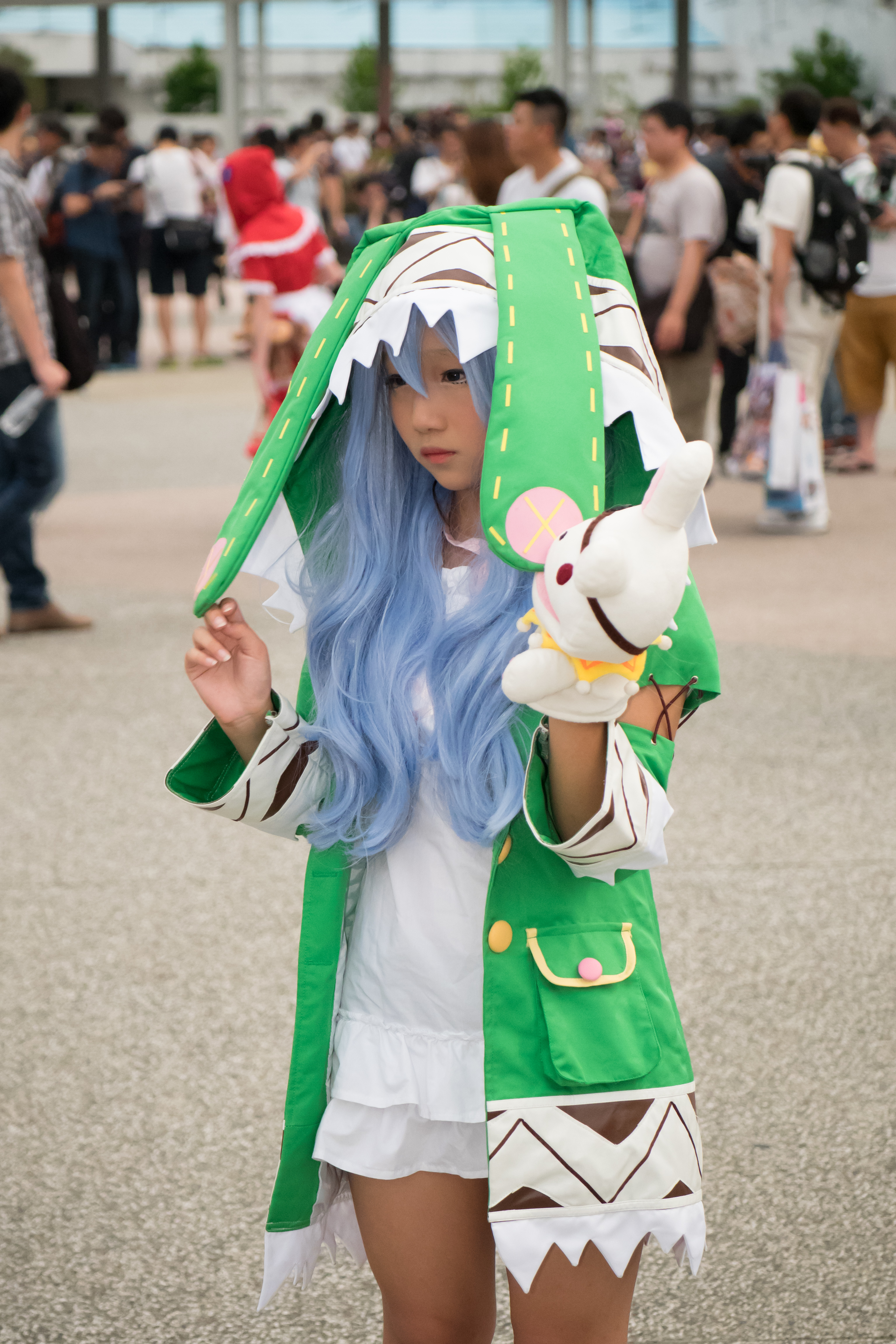 第24屆亞洲動漫創作展，《約會大作戰》四糸乃cosplayer。